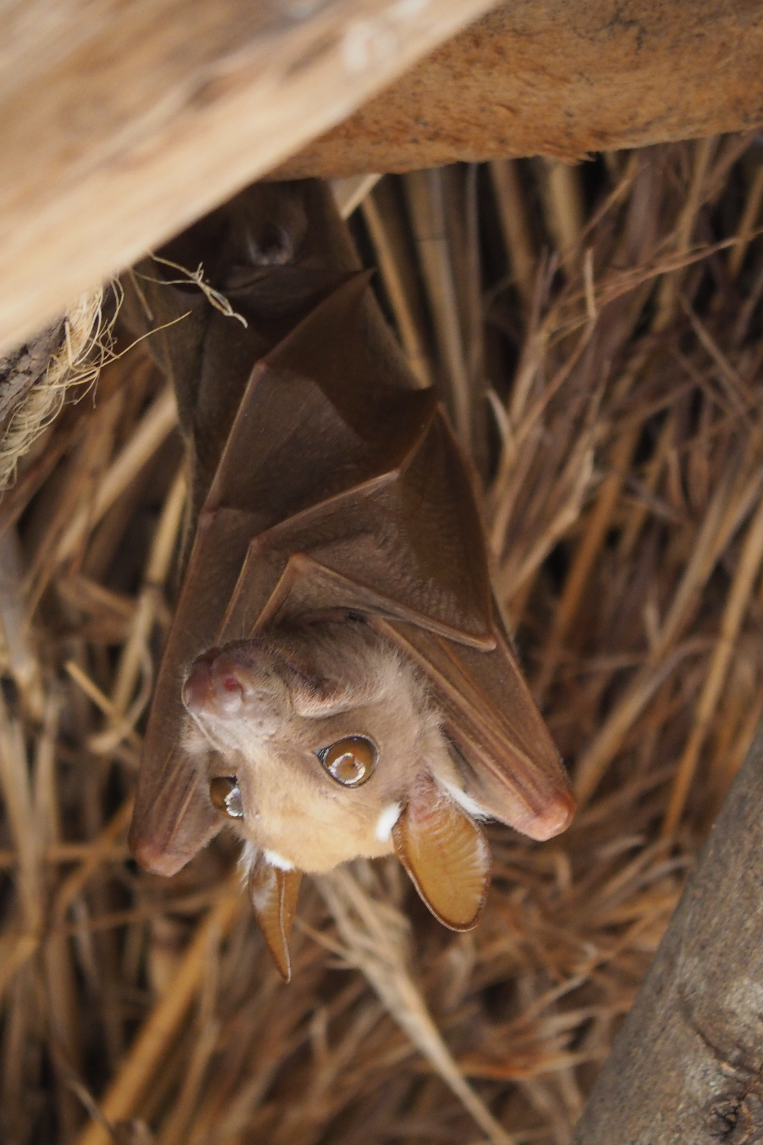 Wahlberg-Epaulettenflughund (Epomophorus wahlbergi)